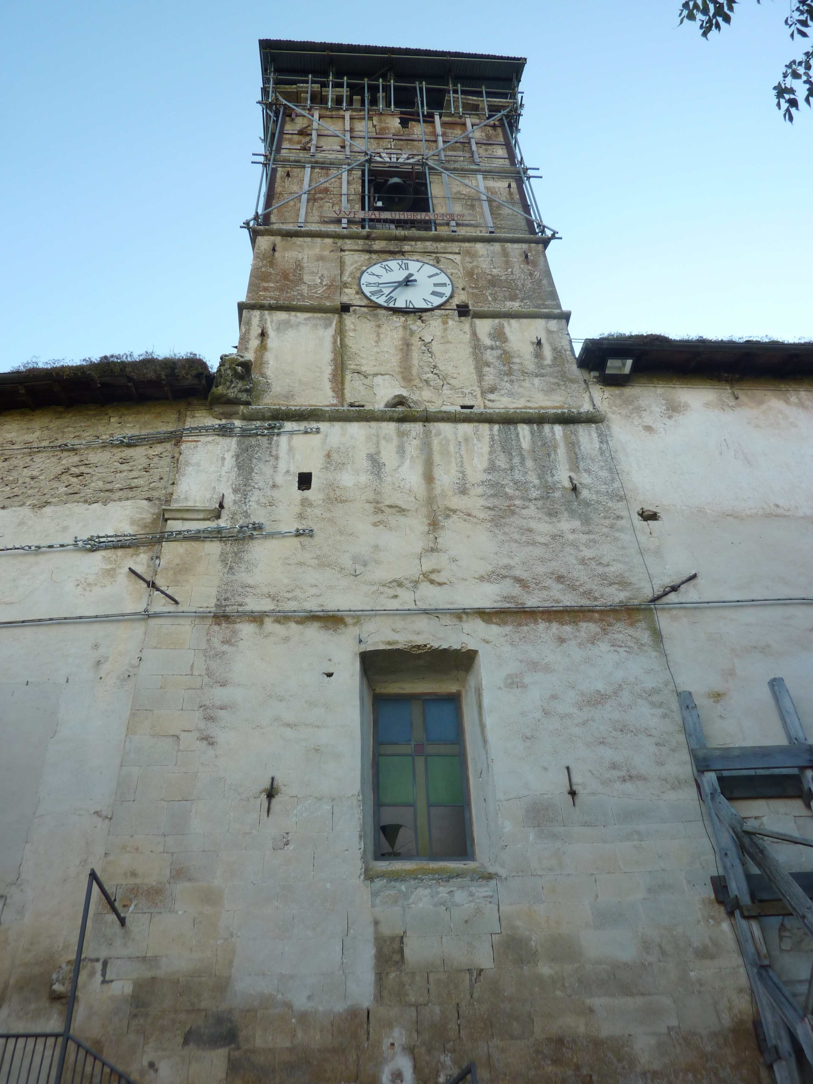 Fossa (AQ): Chiesa di Santa Maria Assunta